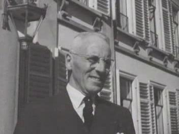 Johan van de Kieft in 1952